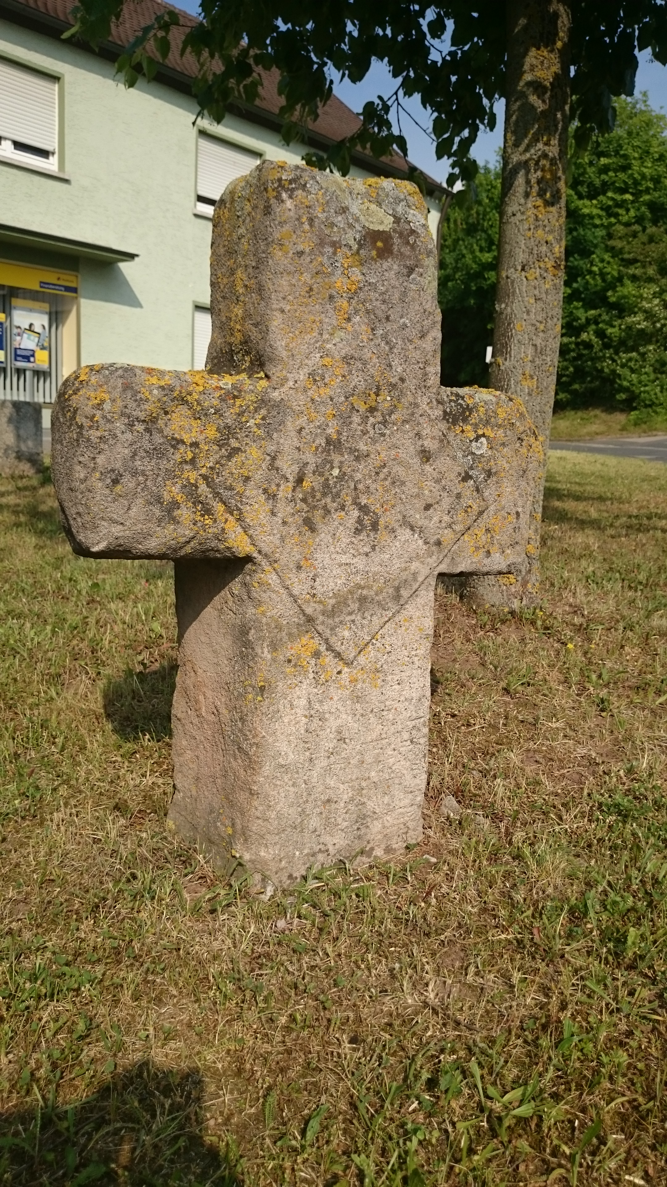 Sühnekreuz in Kleinerlbach, Ortsteil von Neustadt an der Aisch